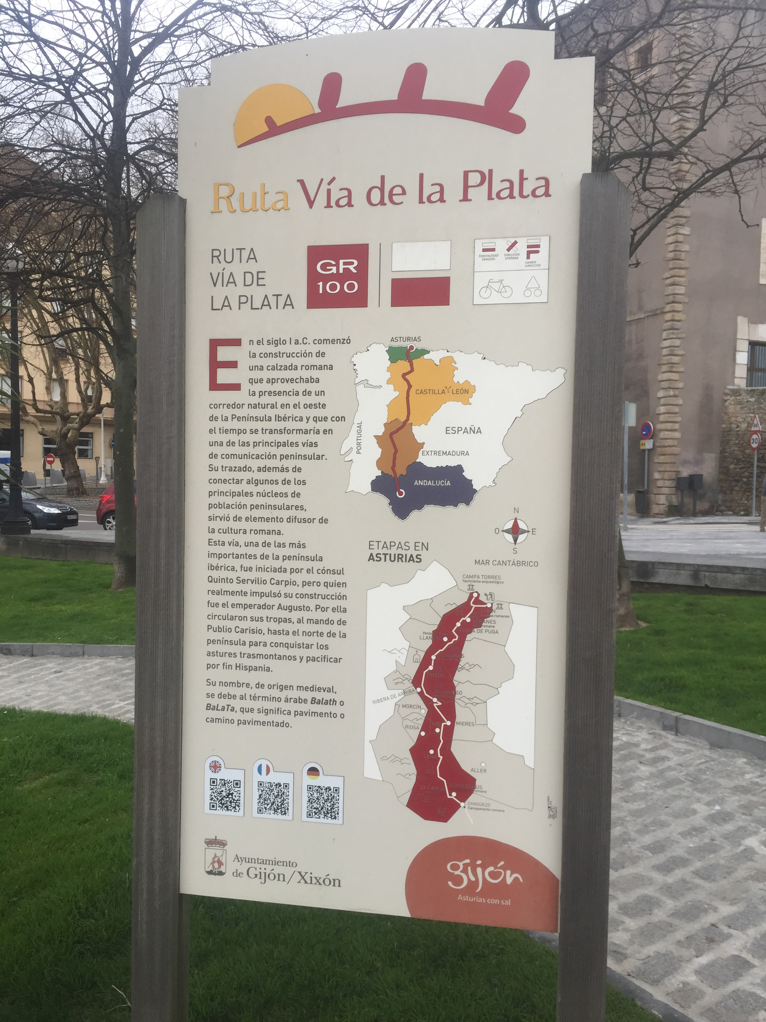 Señal en el inicio del GR-100, Ruta Vía de la Plata, en Gijón